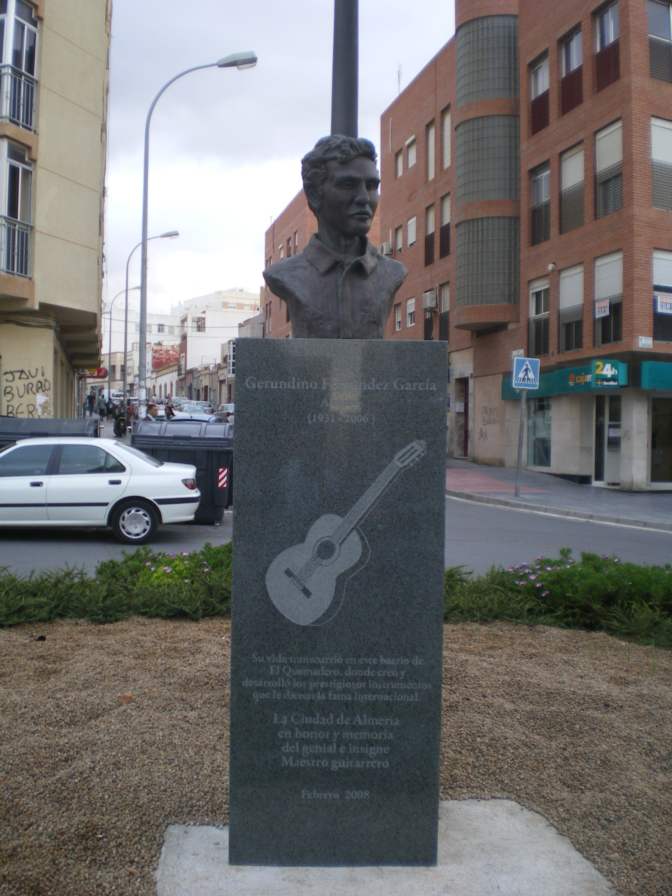 Gerundino Fernández García, constructor de guitarras almeriense; obra de María García Pérez, ubicada en plaza del Quemadero, Almería, España.